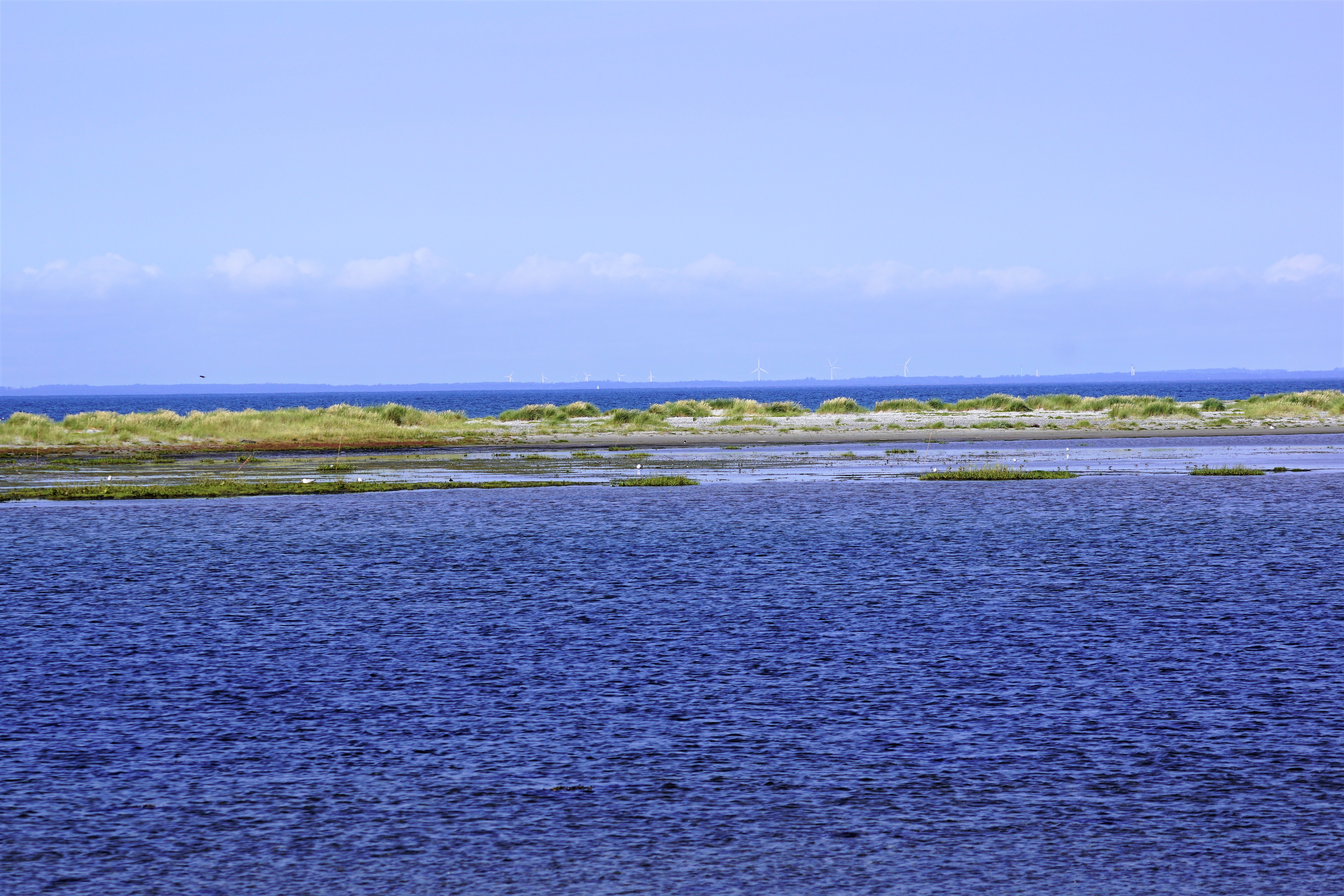 Lagune på øen Stokken ud for vestenden af Læsø